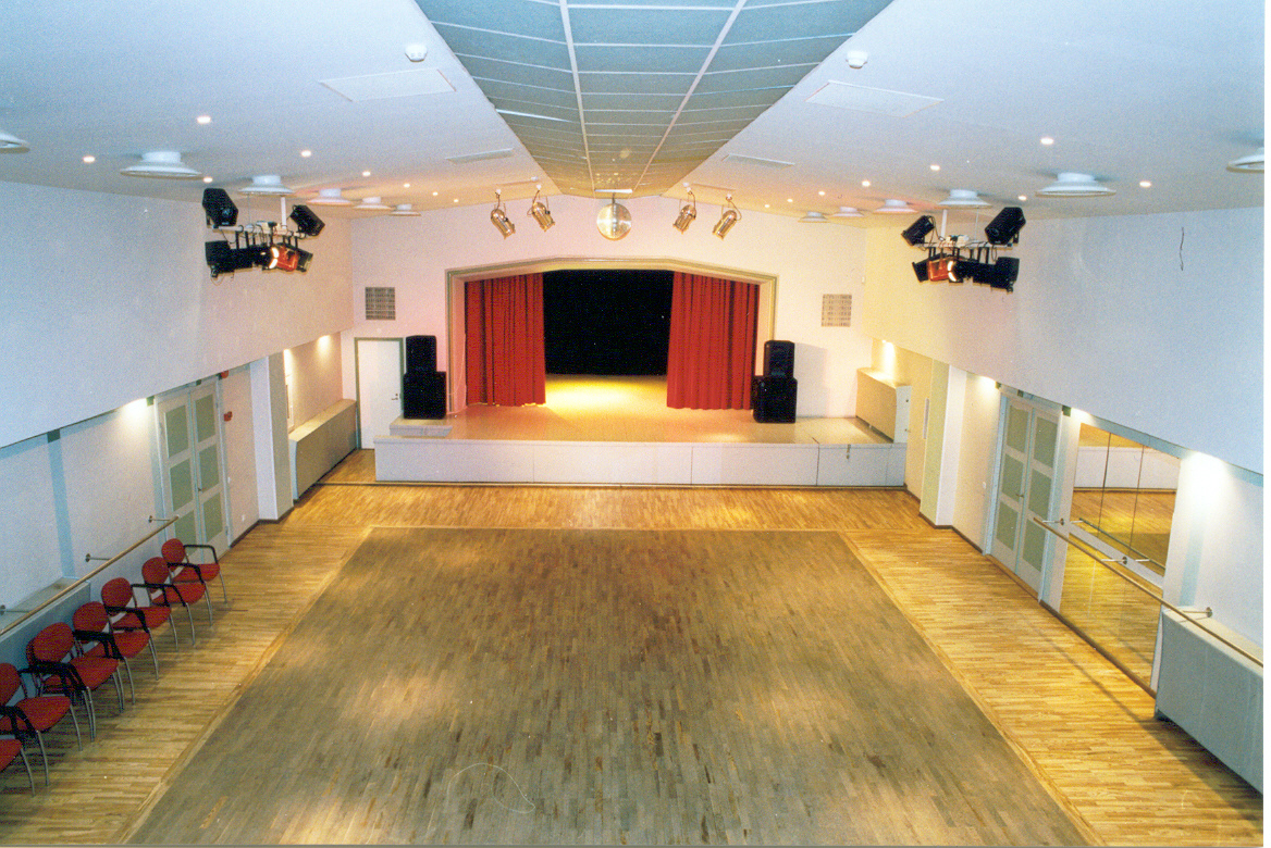 Suur saal